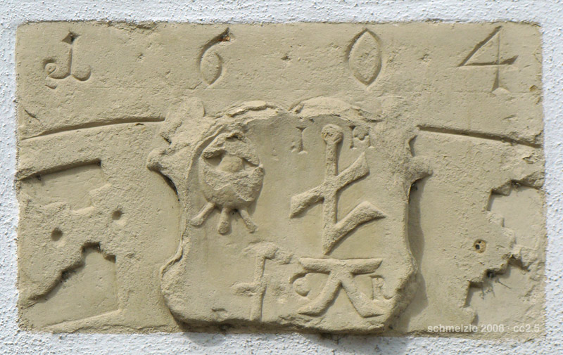 Wappenstein von 1604 am alten Rathaus in Flein, darauf auch der Hl. Veit im Kessel